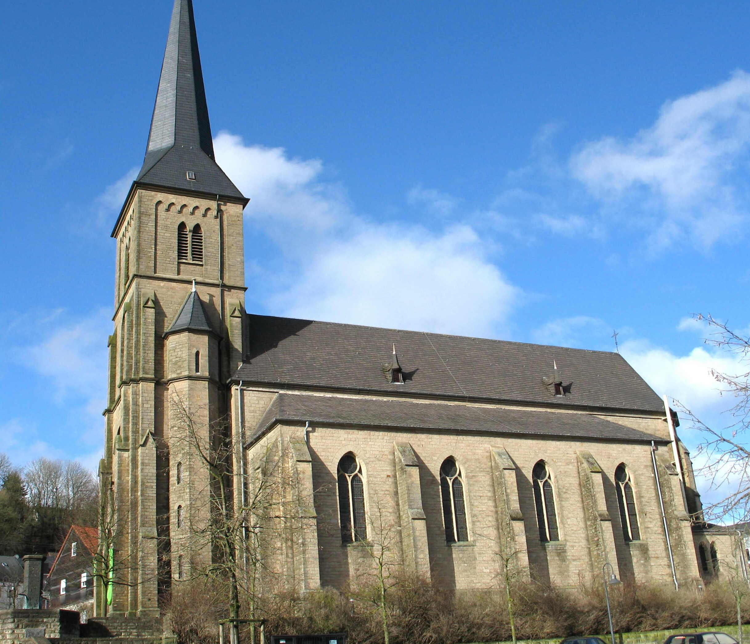 Kierch vun Trierweiler